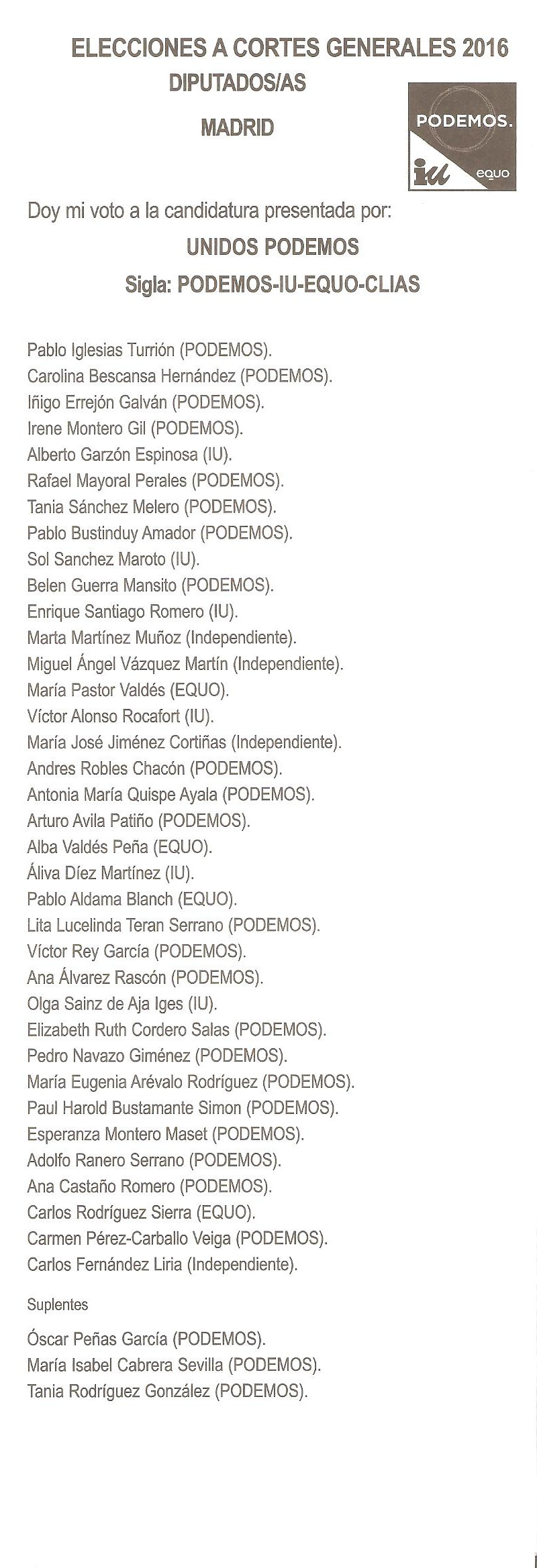 Papeleta de Unidos Podemos para las Elecciones Generales de España de 2016 en la circunscripción de Madrid.